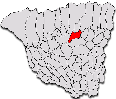 Categorie:Hărţi ale judeţului Gorj